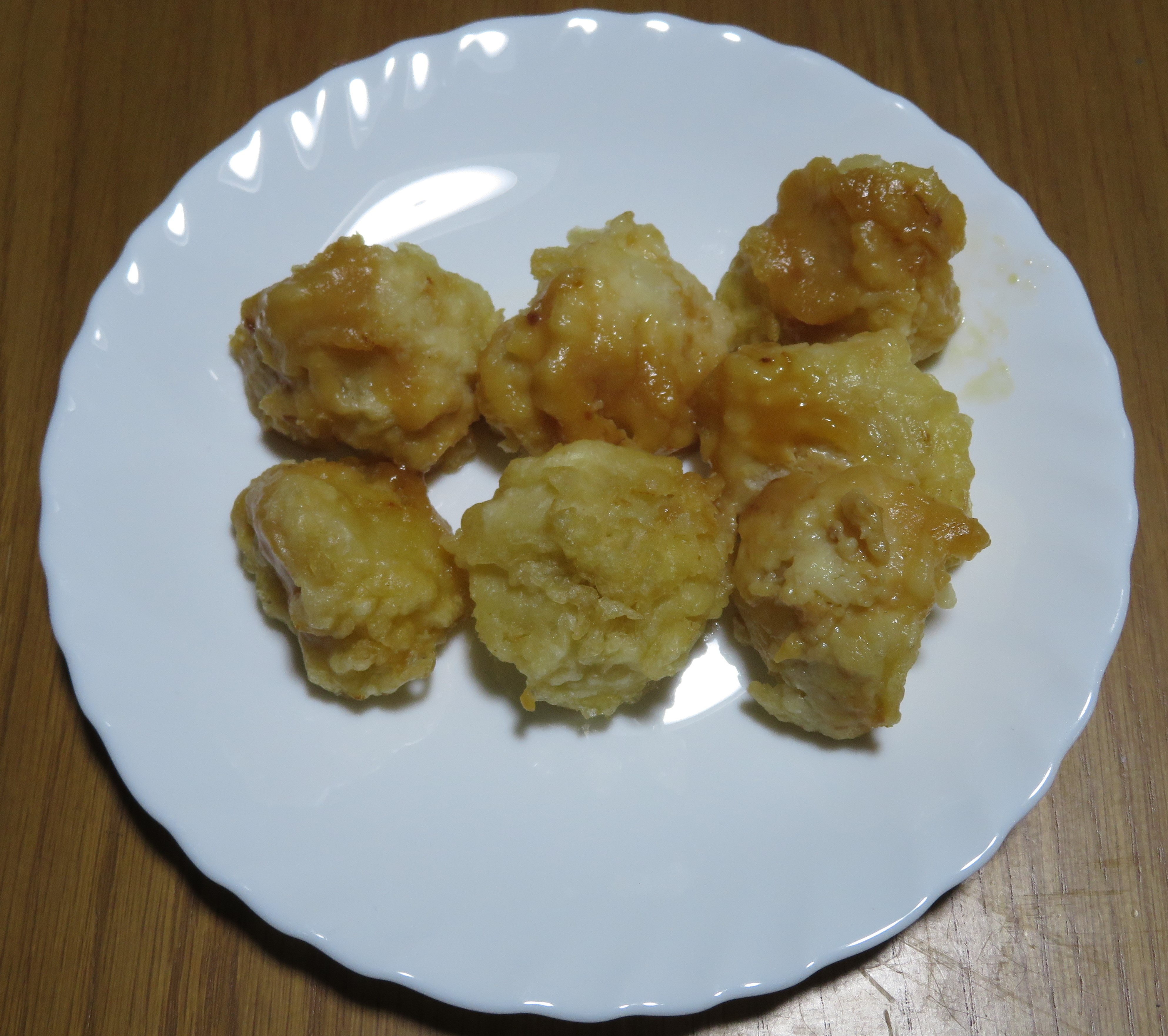 埼玉県秩父地方の郷土料理のみそポテト Canon PowerShot SX720 HS